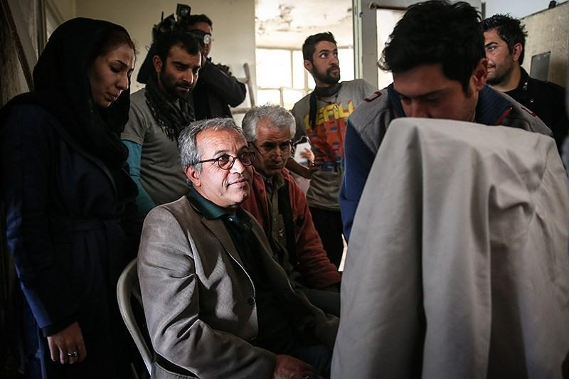 پشت صحنه مجموعه تلویزیونی دودکش دو